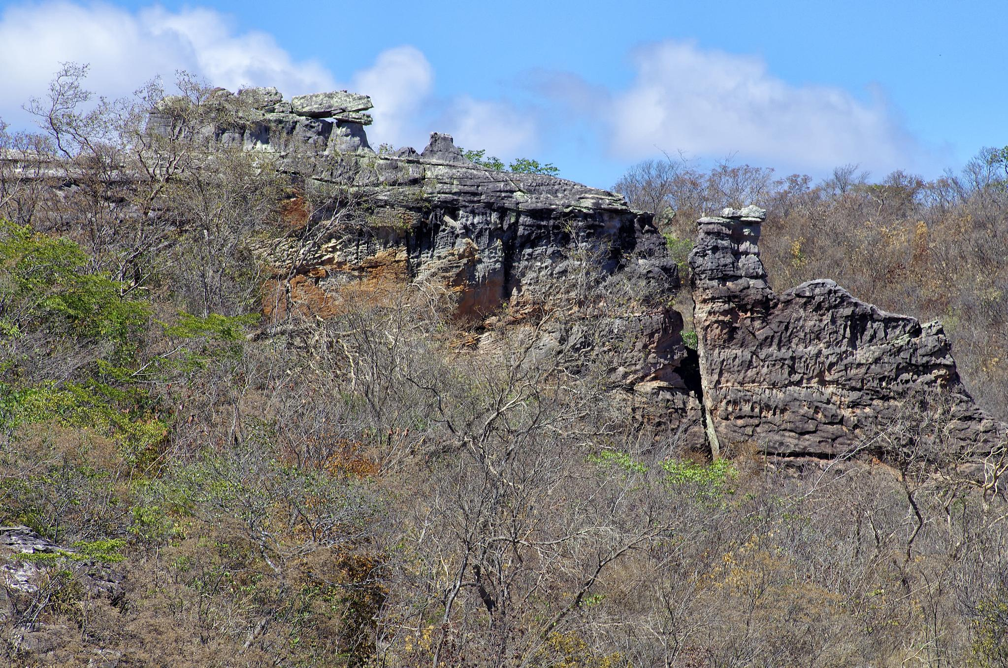 Formação rochosa no interior do parque nacional da Serra das Confusões